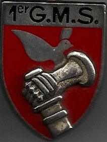 Insigne du 1er Groupement de missiles stratégiques